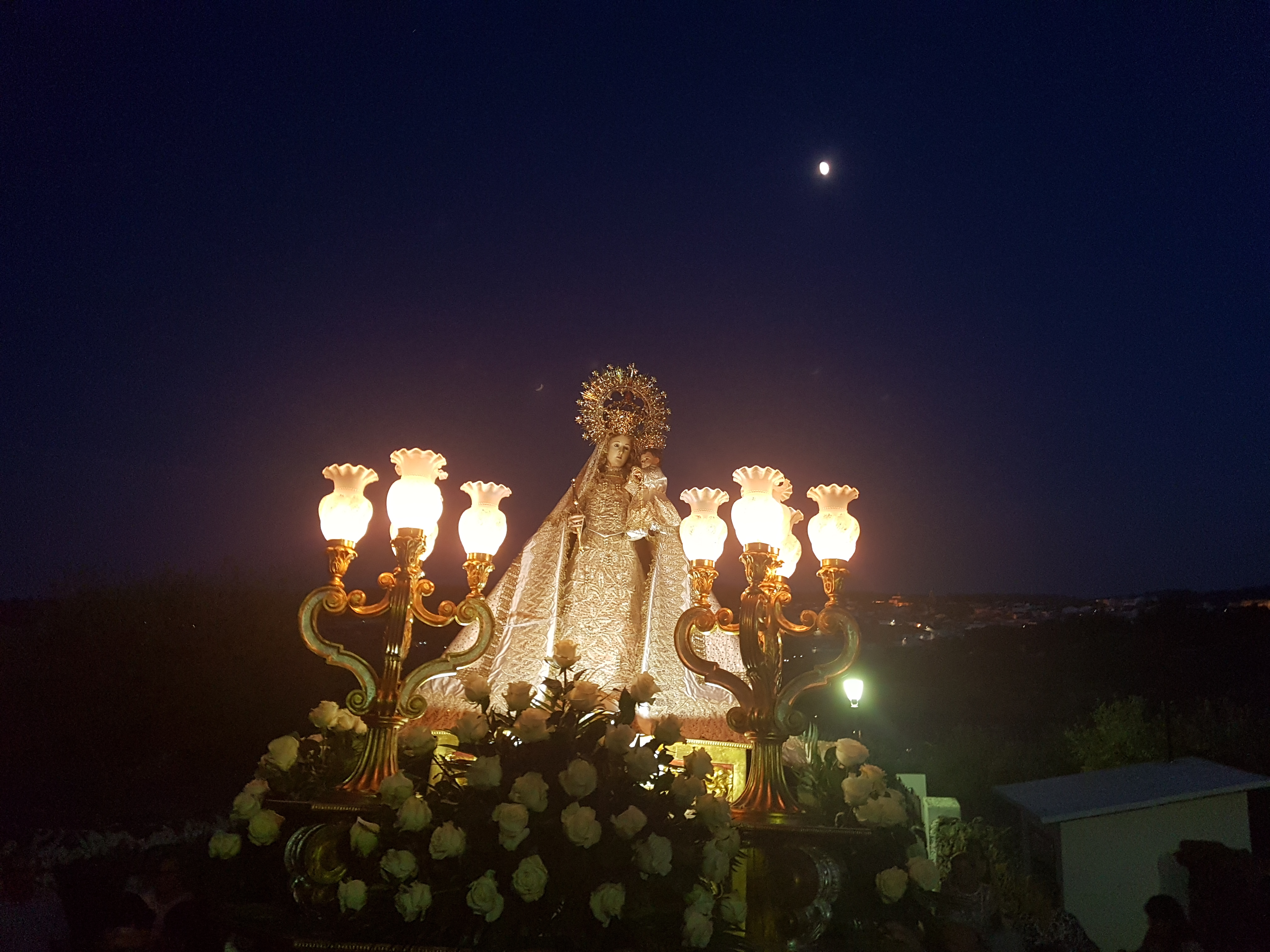 Subida de la patrona de Valencia de Alcántara a su ermita el segundo domingo de septiembre.